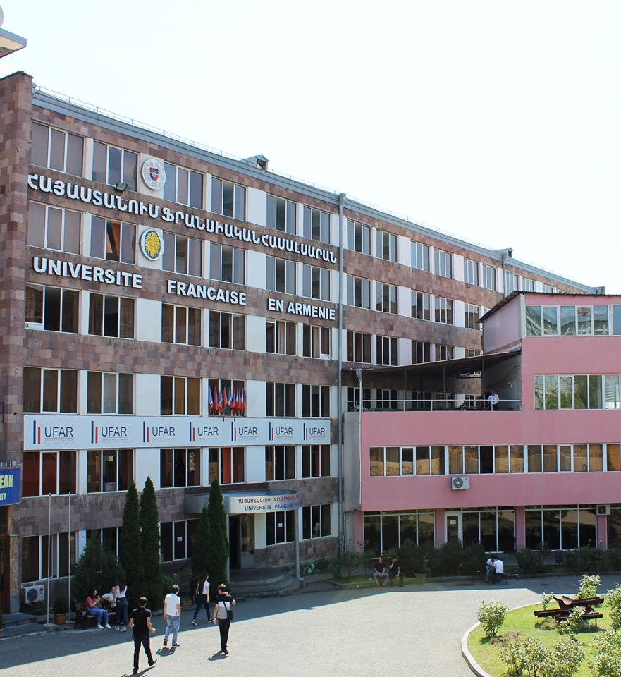 UFAR building